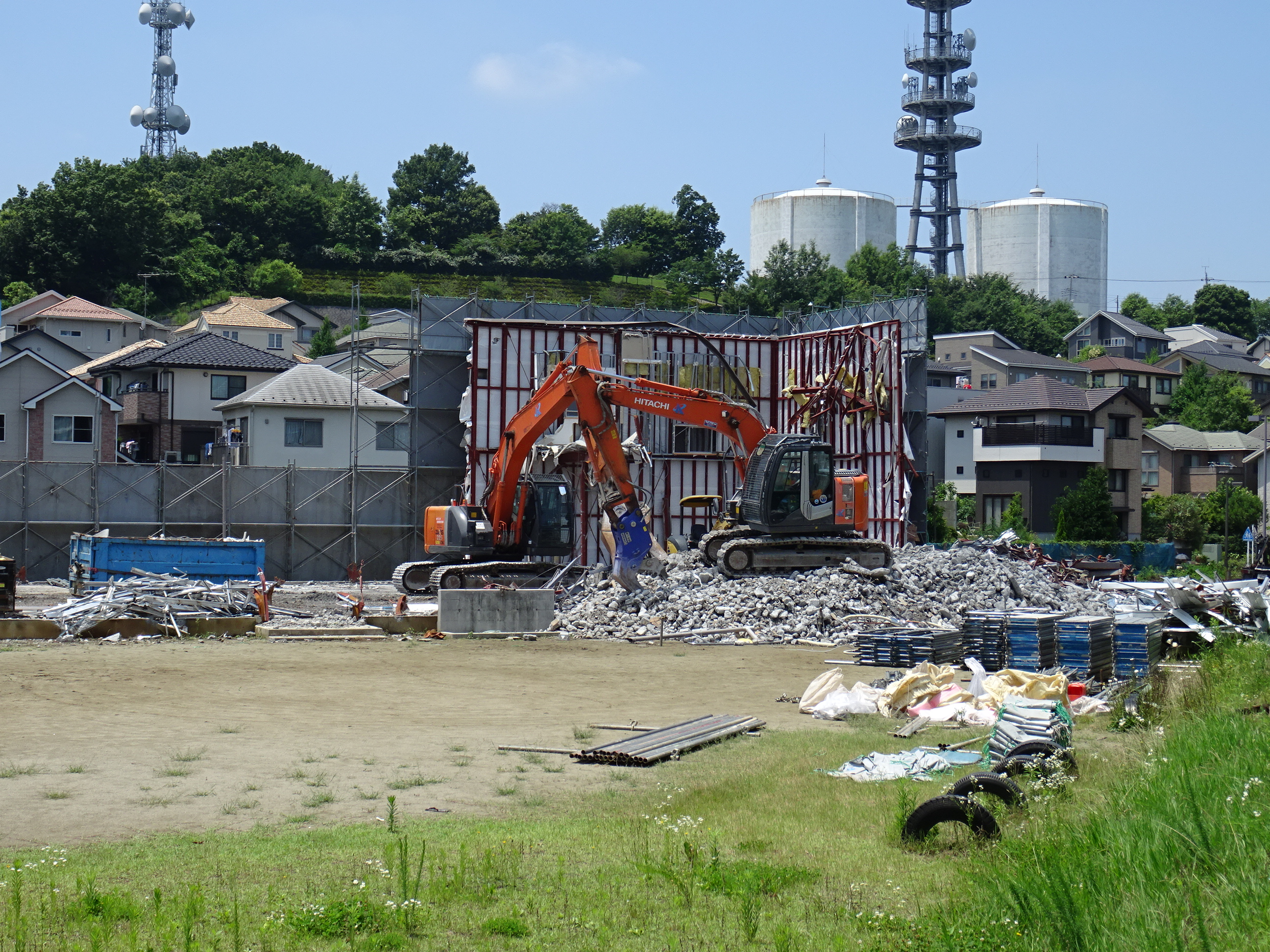 多摩ニュータウンで少子化に伴い解体されるプレハブ校舎（15/07/10撮影）